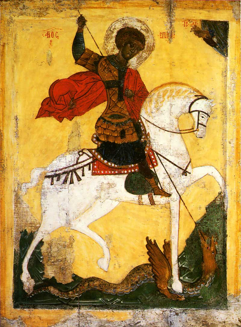 Икона Чудо Геогия о змие. Русский Север (Обонежье). Вторая половина XVI в. Дерево, темпера. 73 × 54 см Карельский музей изобразительных искусств, Петрозаводск, Россия Wikidata has entry Q17098127 with data related to this item.